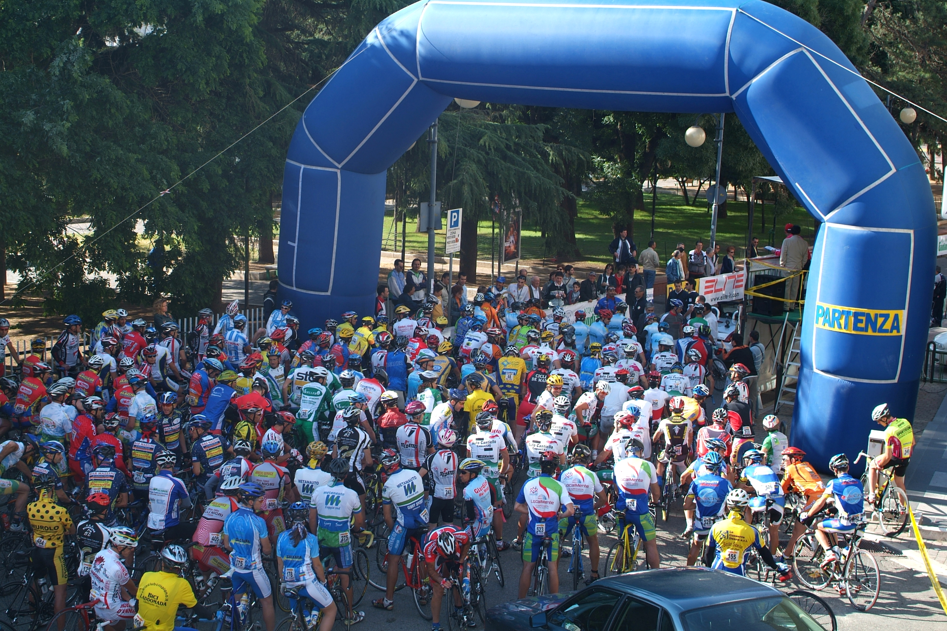 Gran Fondo del Vulture, edizione 2005